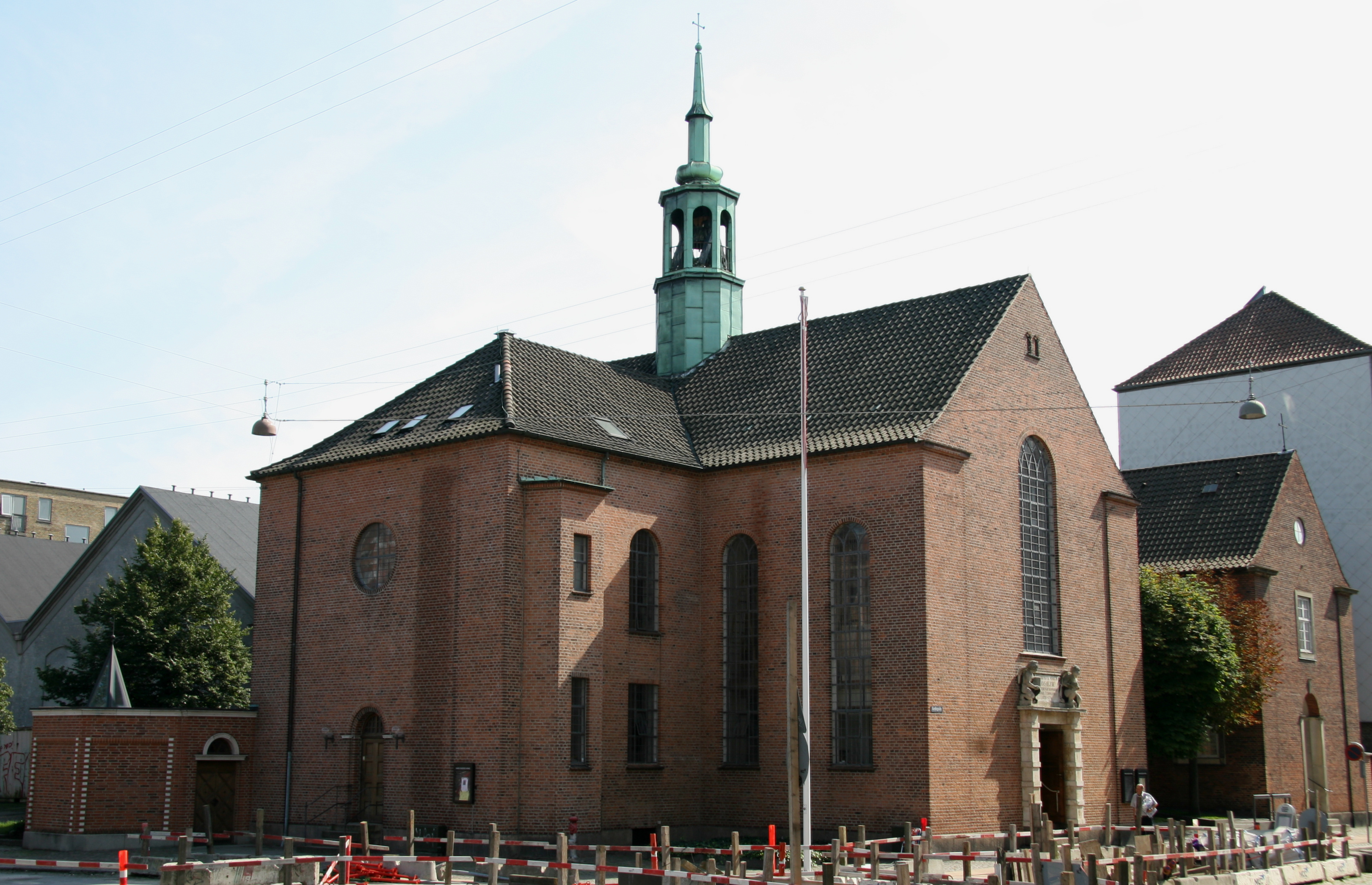 Hans Egeds Kirke in Copenhagen, Denmark.